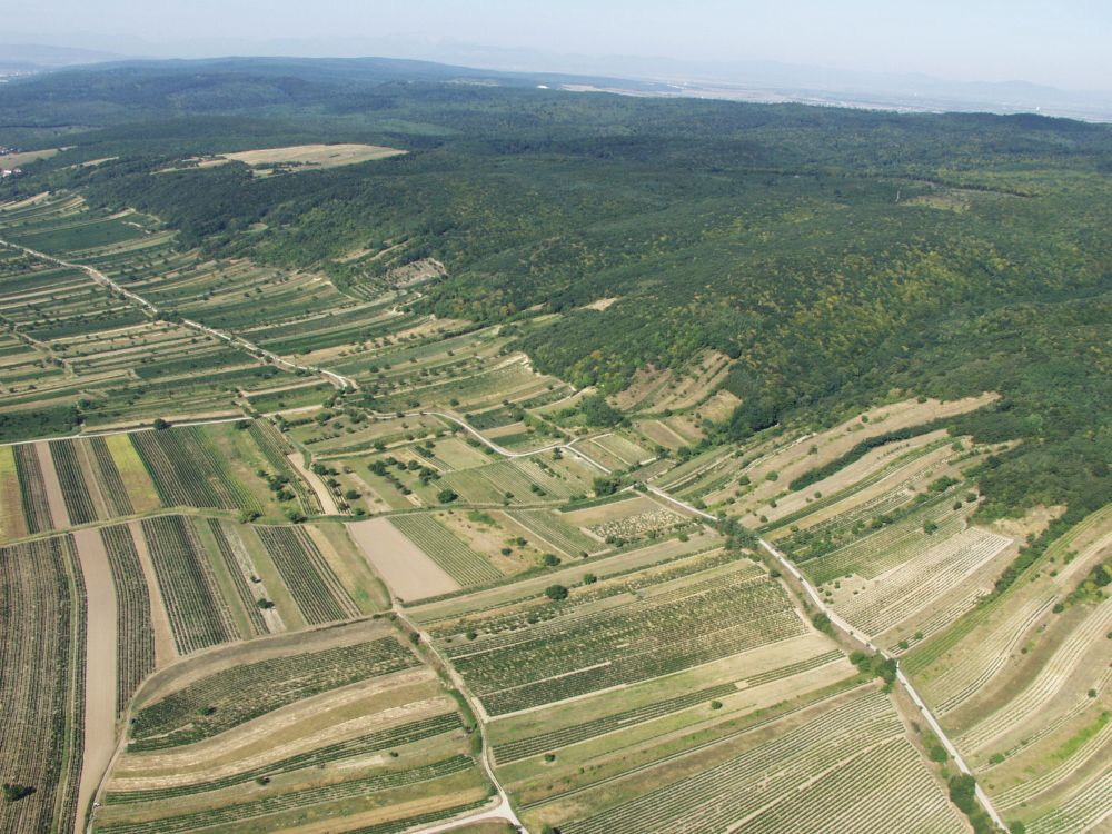 A Lajta-hegység keleti oldala Fertőszéleskút és Feketeváros közt, Ausztria